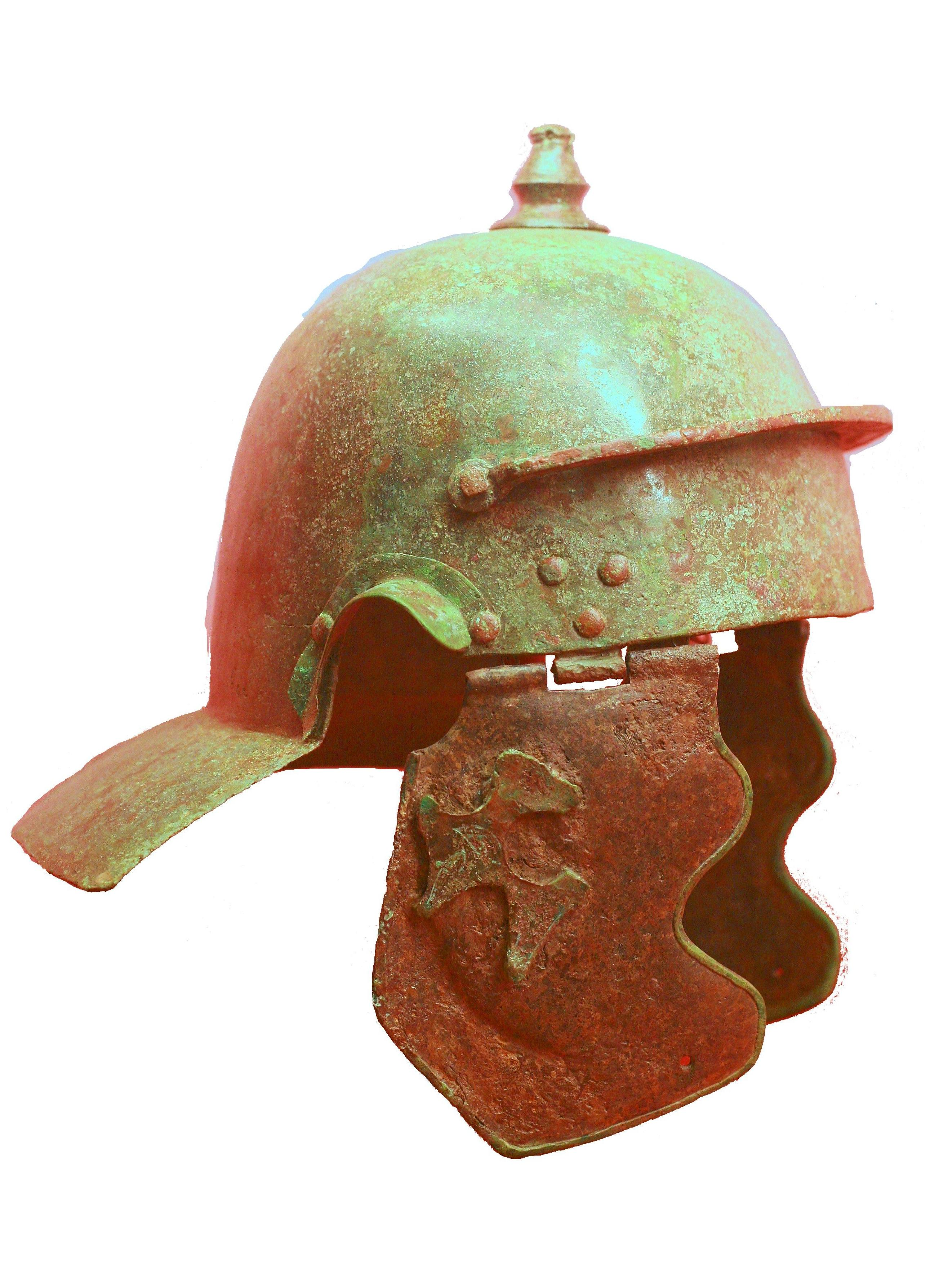 Römischer Helm vom Typ Weisenau. Museum Carnuntum